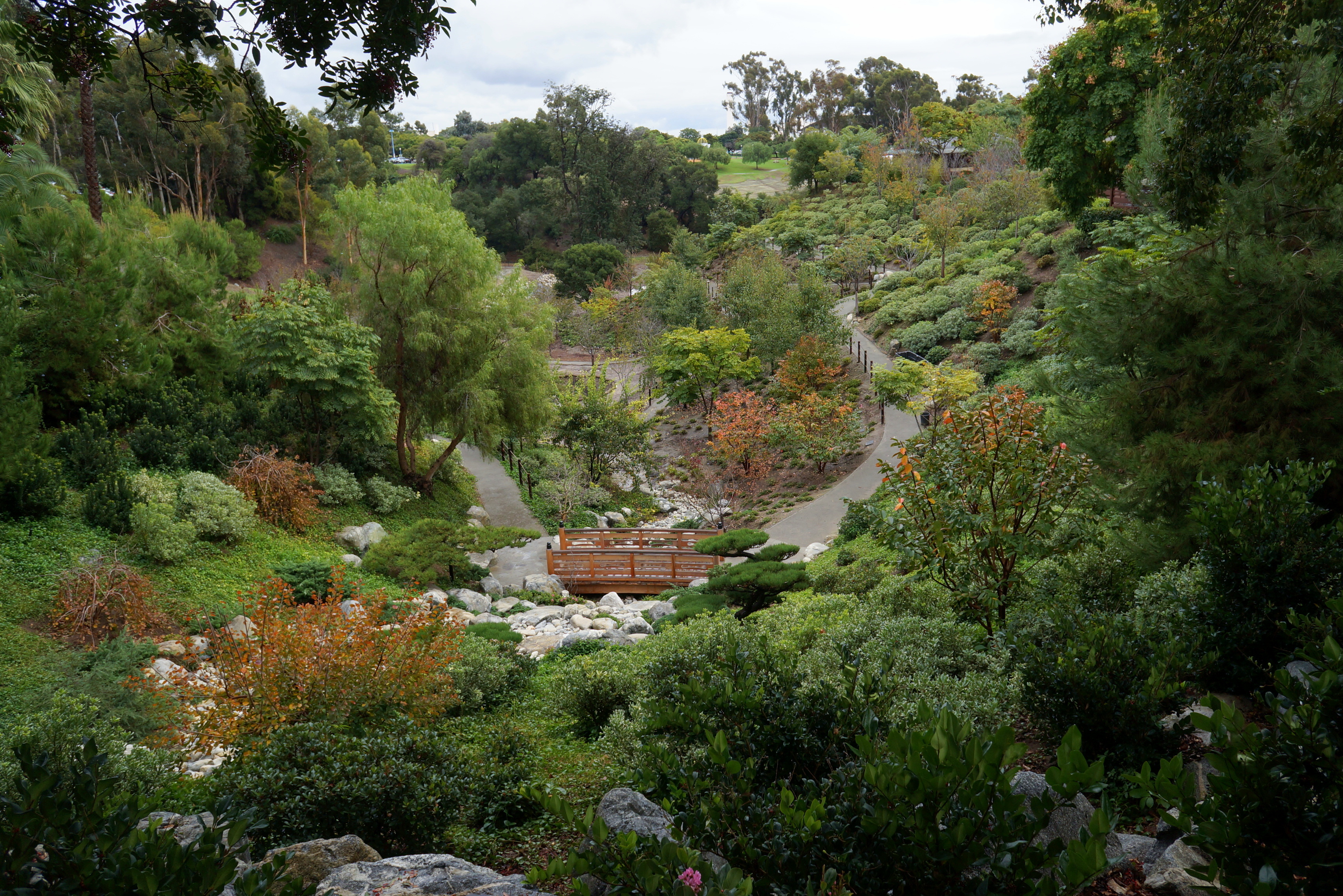 Balboa Park - San Diego (CA)